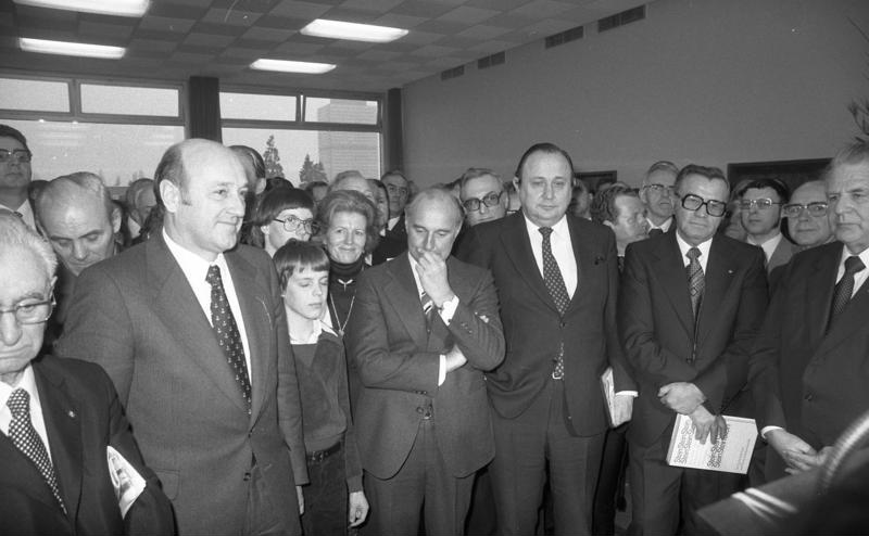 Empfang zum 50. Geburtstag des Präsidenten des Zentralverbandes des Deutschen Handwerks, Paul Schnitker im Haus des Deutschen Handwerks in Bonn.